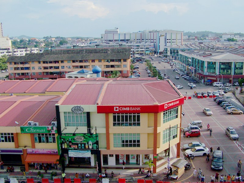 居銮市容 （从福联广场拍摄，后方有地王广场）